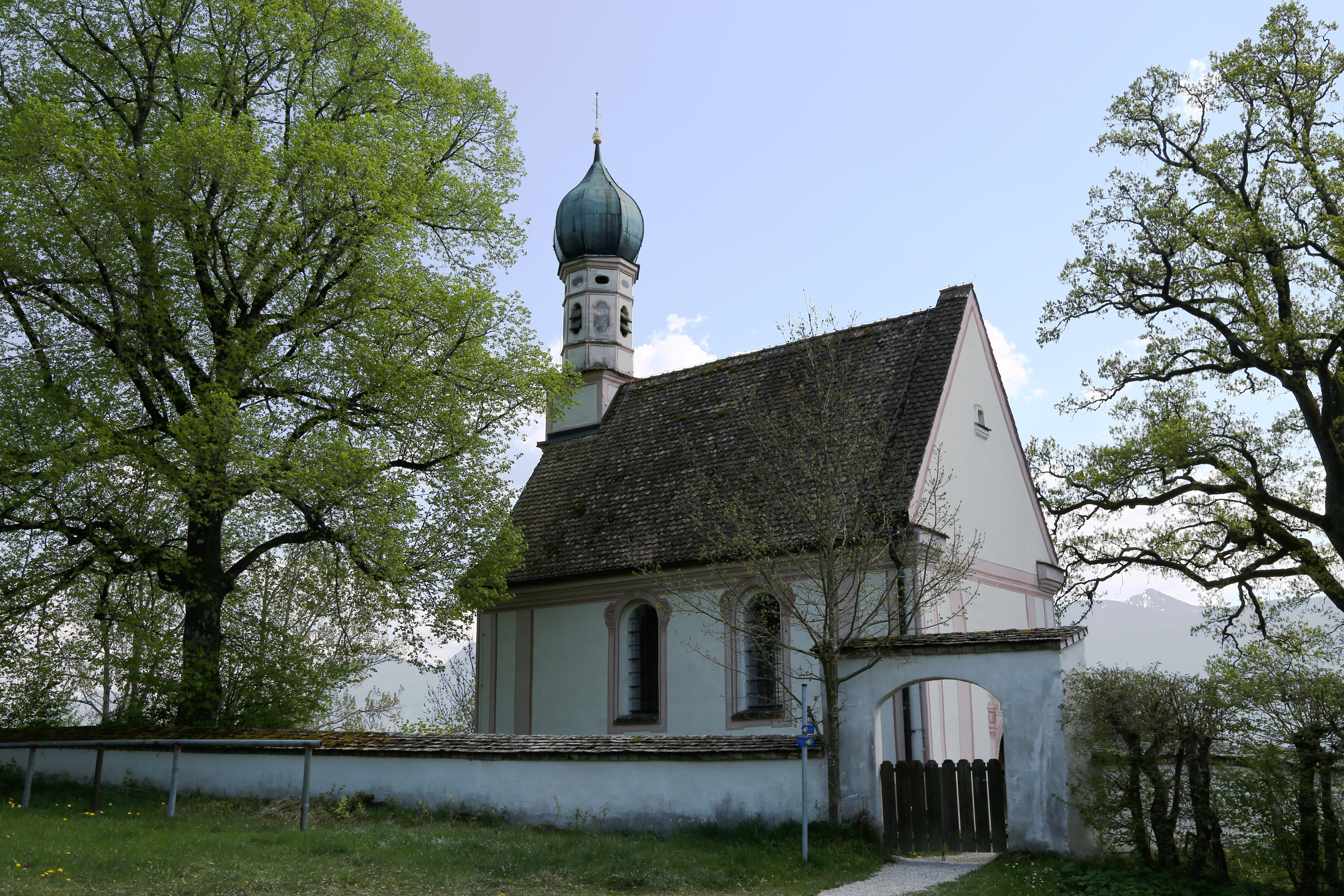 Kirche St. Georg bei Ramsach, Murnau am Staffelsee